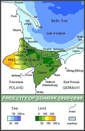 Free City of Gdansk/Wolne Miasto Gdańsk